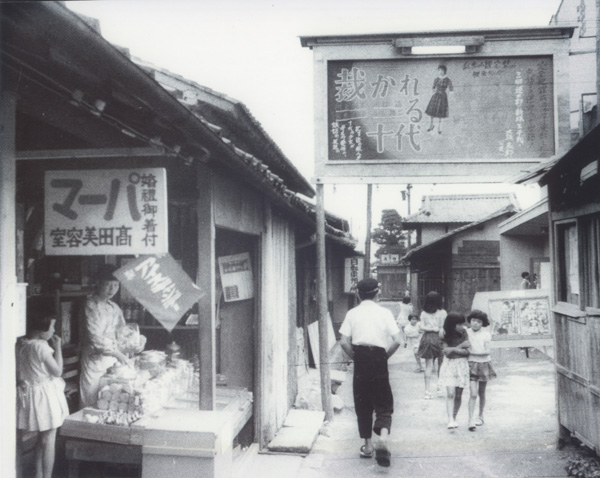 滋賀県草津市の草津映画劇場、1956年の写真。